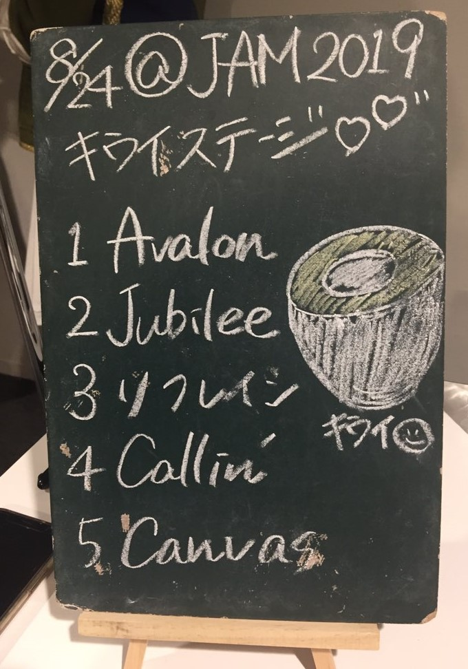 amiinAセトリボード